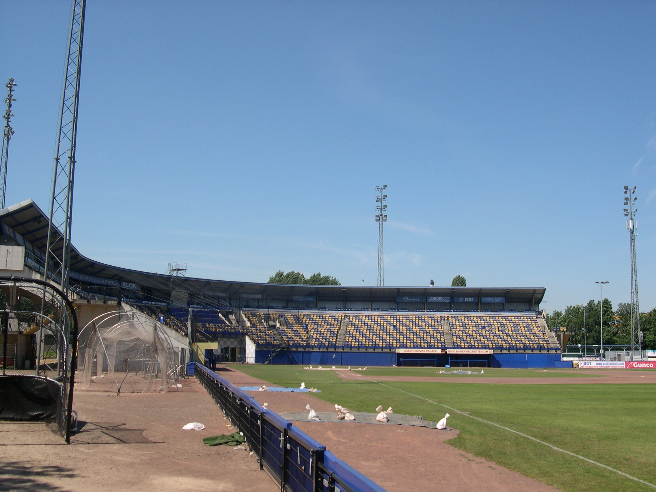 Het stadion van honkbalclub SC Neptunus in Rotterdam Foto genomen door Magalhães op 3 juli 2006